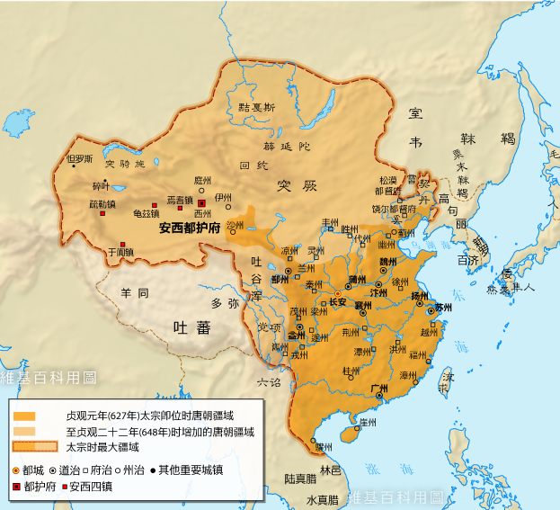 唐太宗时疆域图